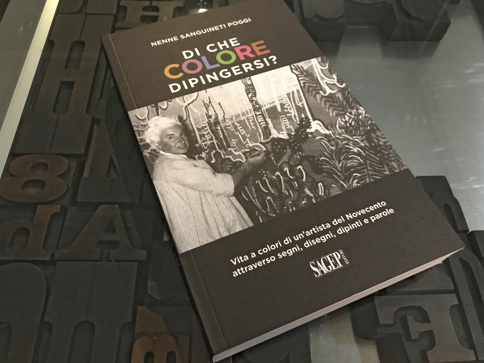 Nuova edizione del libro "Di che colore dipingersi?"